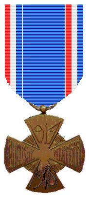 Het Mobilisatiekruis 1914-1918